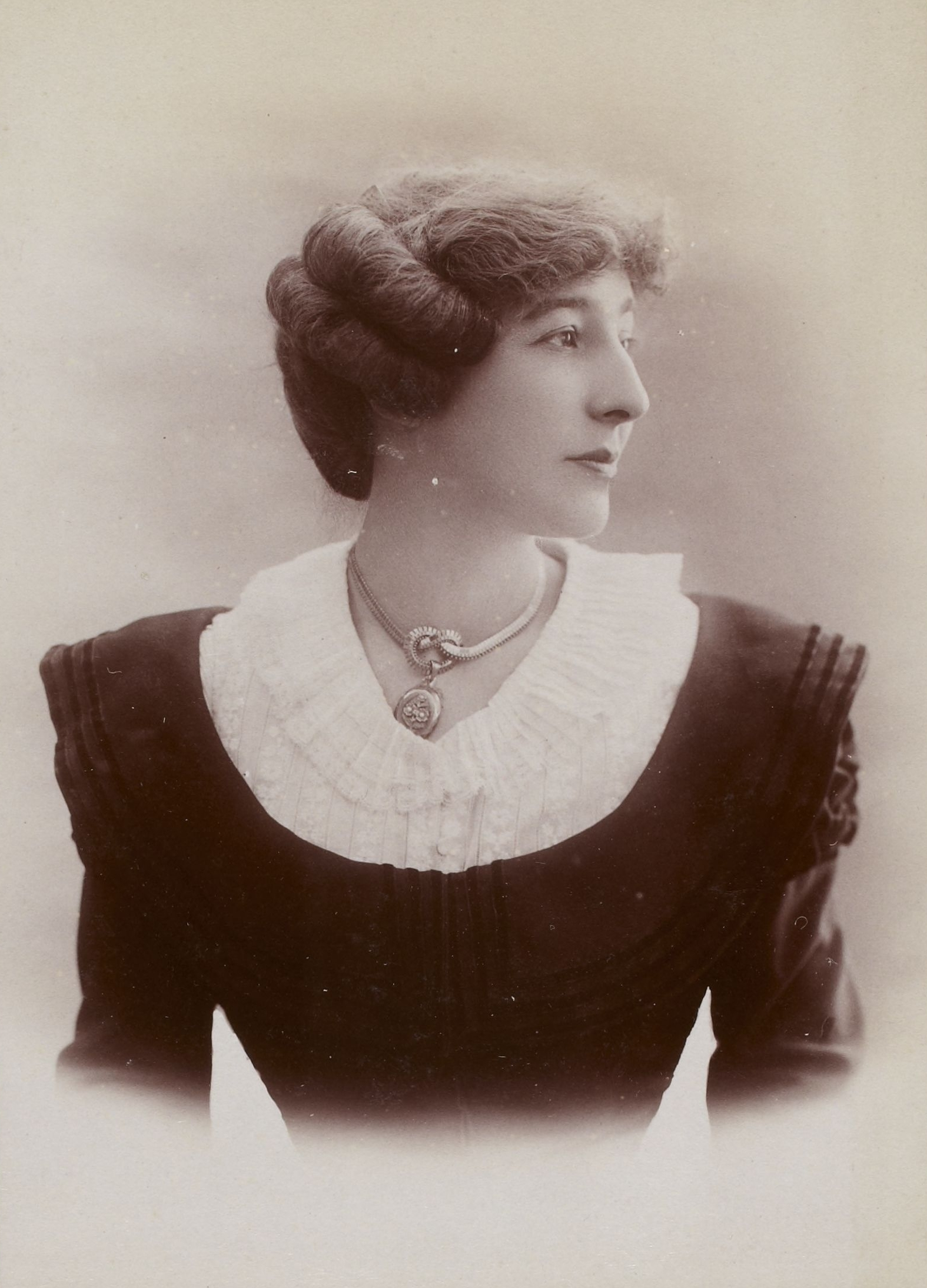 Album Reutlinger de portraits divers, vol. 23 : [photographie positive] : Andrée Mégard dans "La Rabouilleuse".